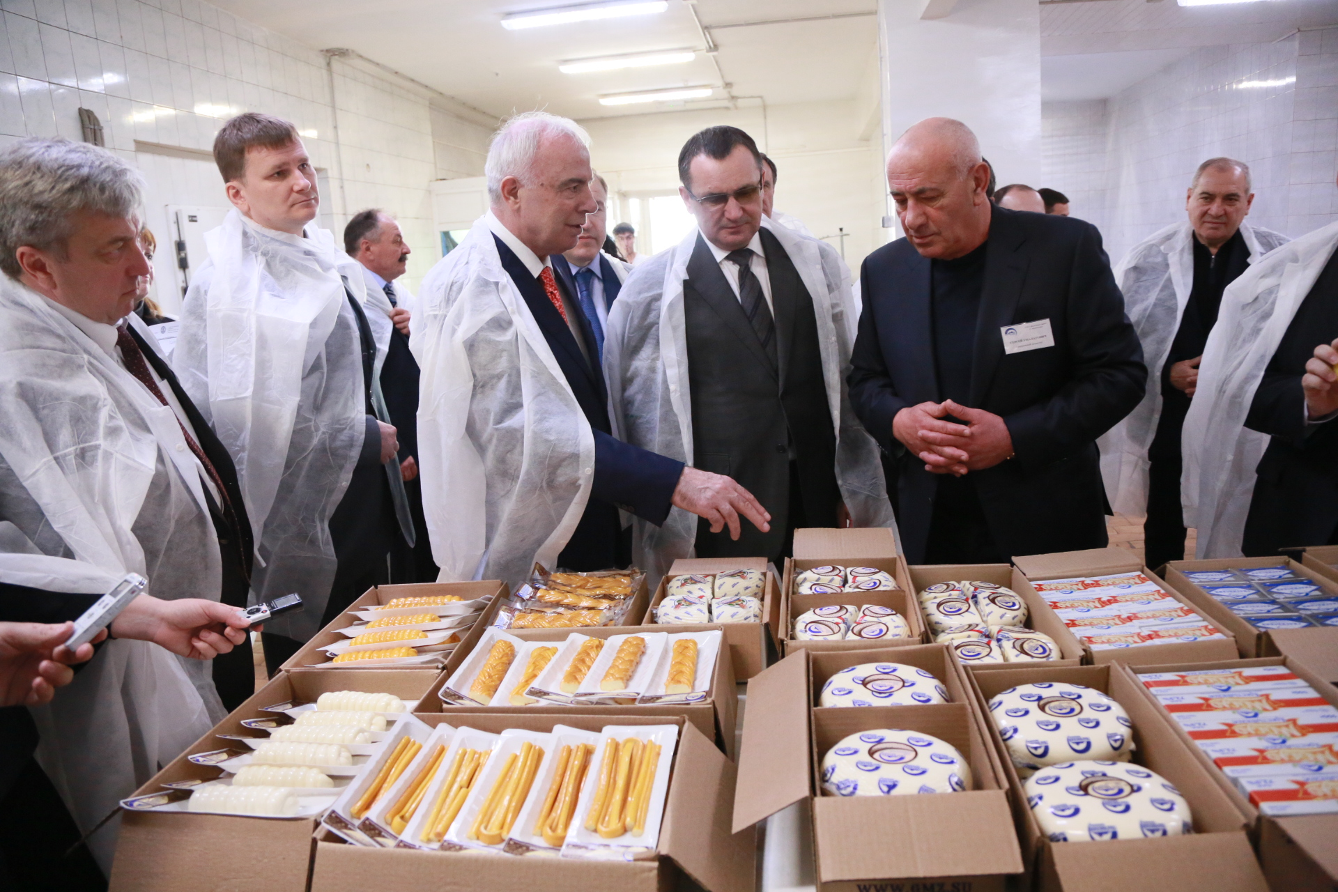 Министр с/х Федорову Н.В. знакомится с продукцией Молзавода "Гиагинский"